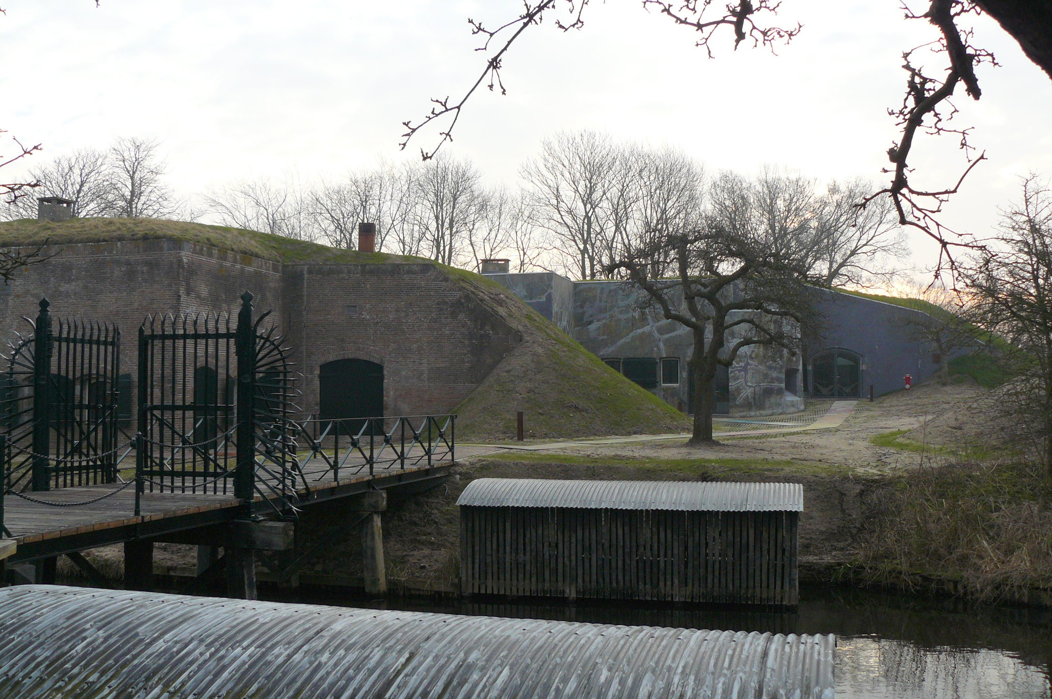 Fort Kijkuit: brug met links het magazijn en rechts is het wachthuis zichtbaar.